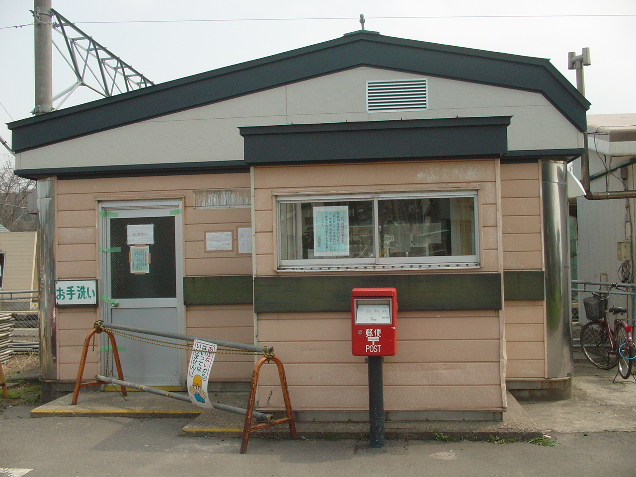 （旧大釈迦駅）